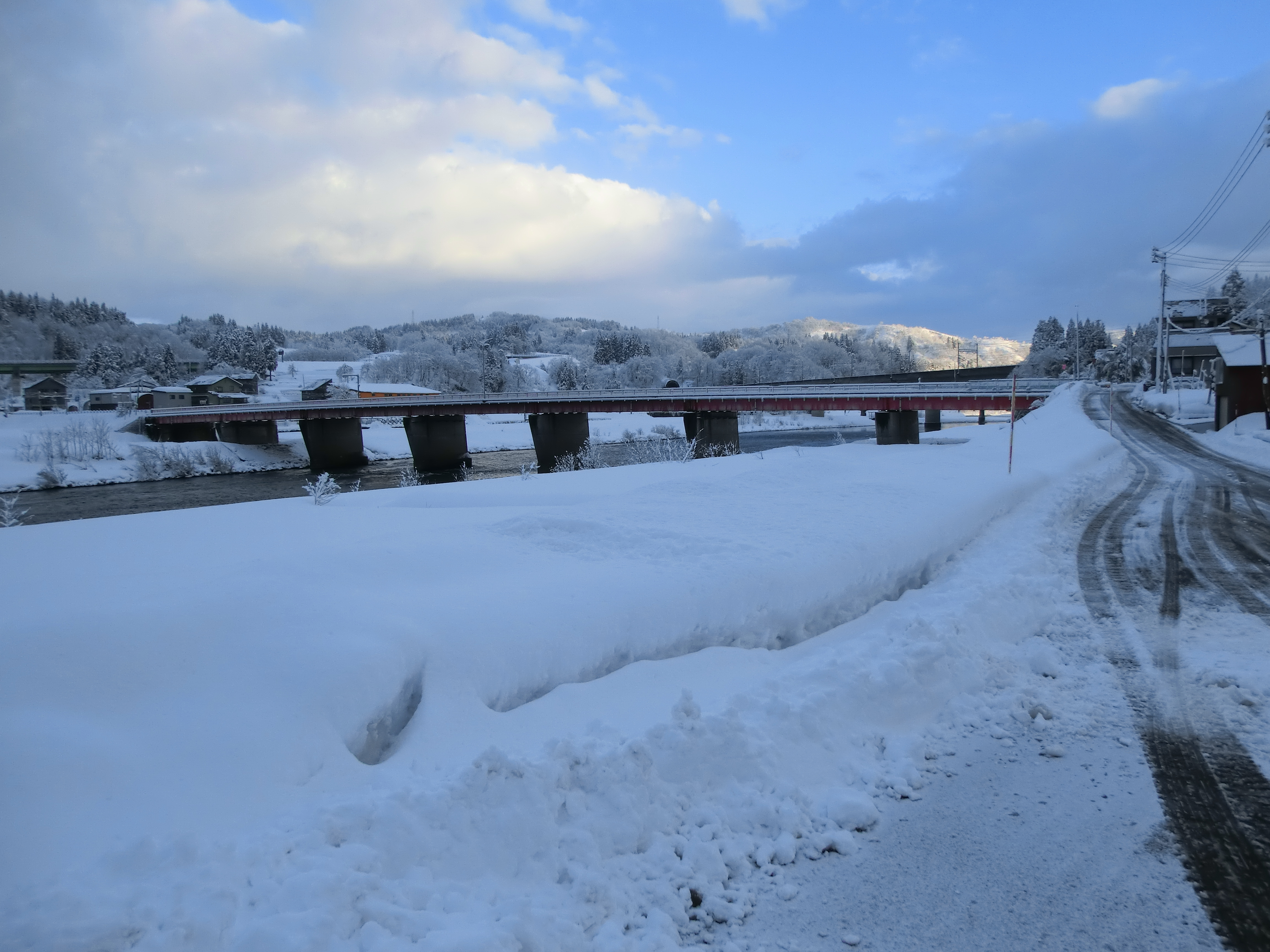 この画像は2018年1月14日投稿者によって、新潟県長岡市川口和南津にて撮影された、魚野川に架かっている和南津橋（国道17号）の写真。（魚野川下流左岸側より撮影。）